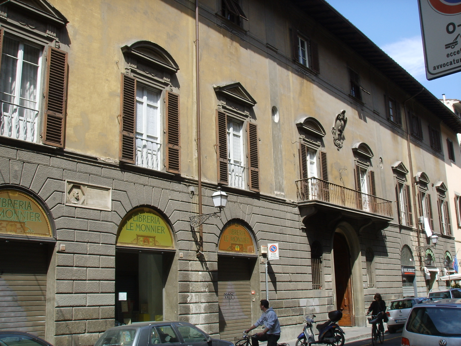 Palazzo Fenzi in florence